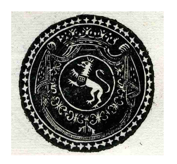 Siegel des spanisch-niederländischen Fürsten Albert Octave t’Serclaes de Tilly mit dem Orden vom Goldenen Vlies.